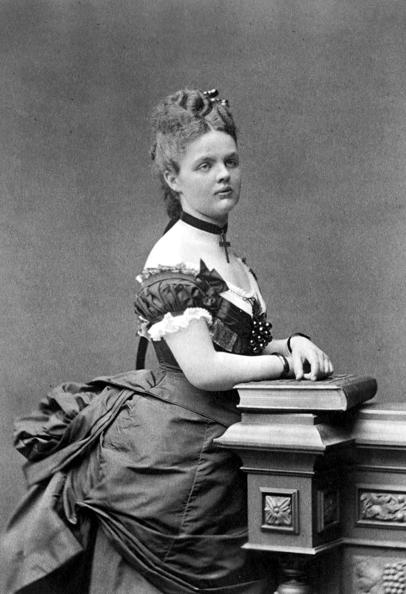 Porträtt av prinsessan Pauline av Waldeck och Pyrmont (1855-1925).